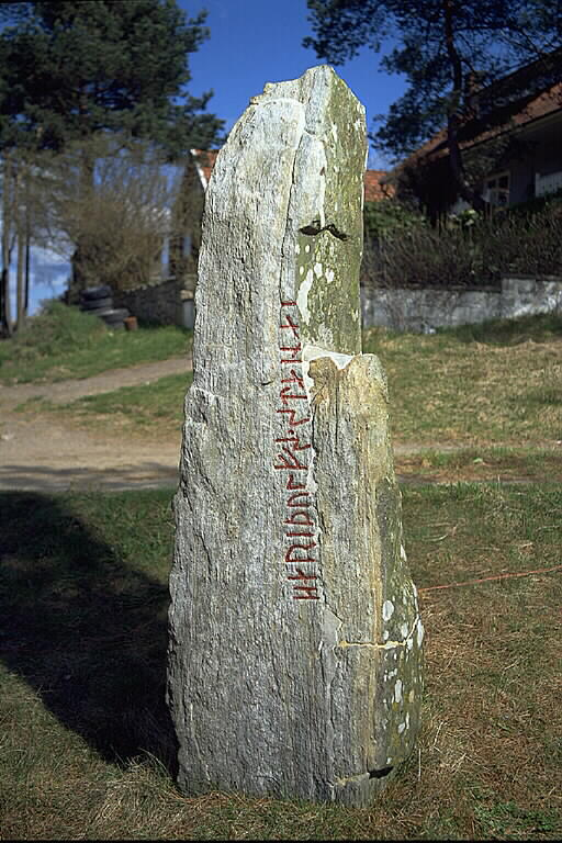 Inskriften lyder: Redulfs/Härulfs stenar. Valla 117:1. Signum Bo KJ80 (tidigare Bo Krause1966;70)